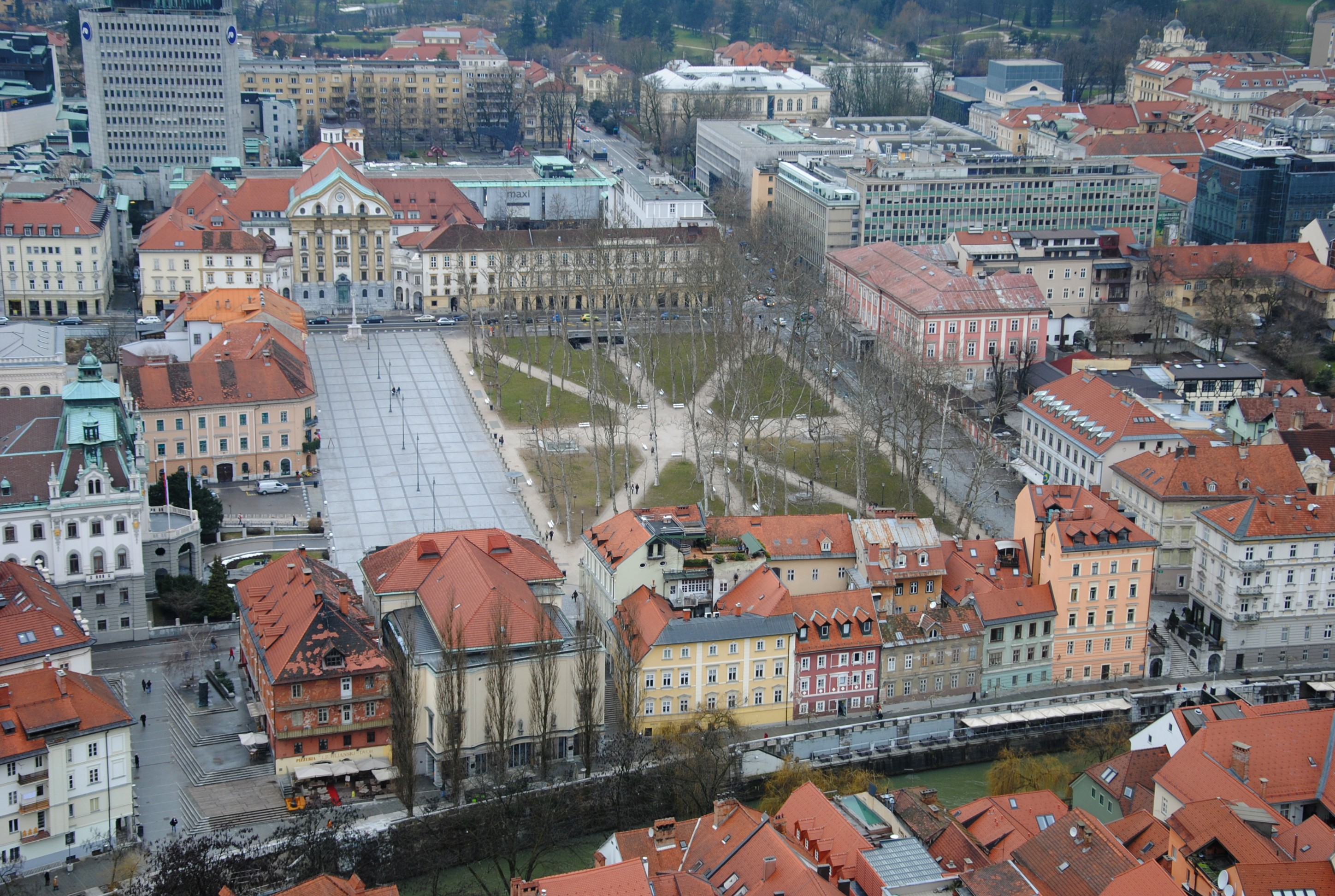 Ljubljana, Slovenia